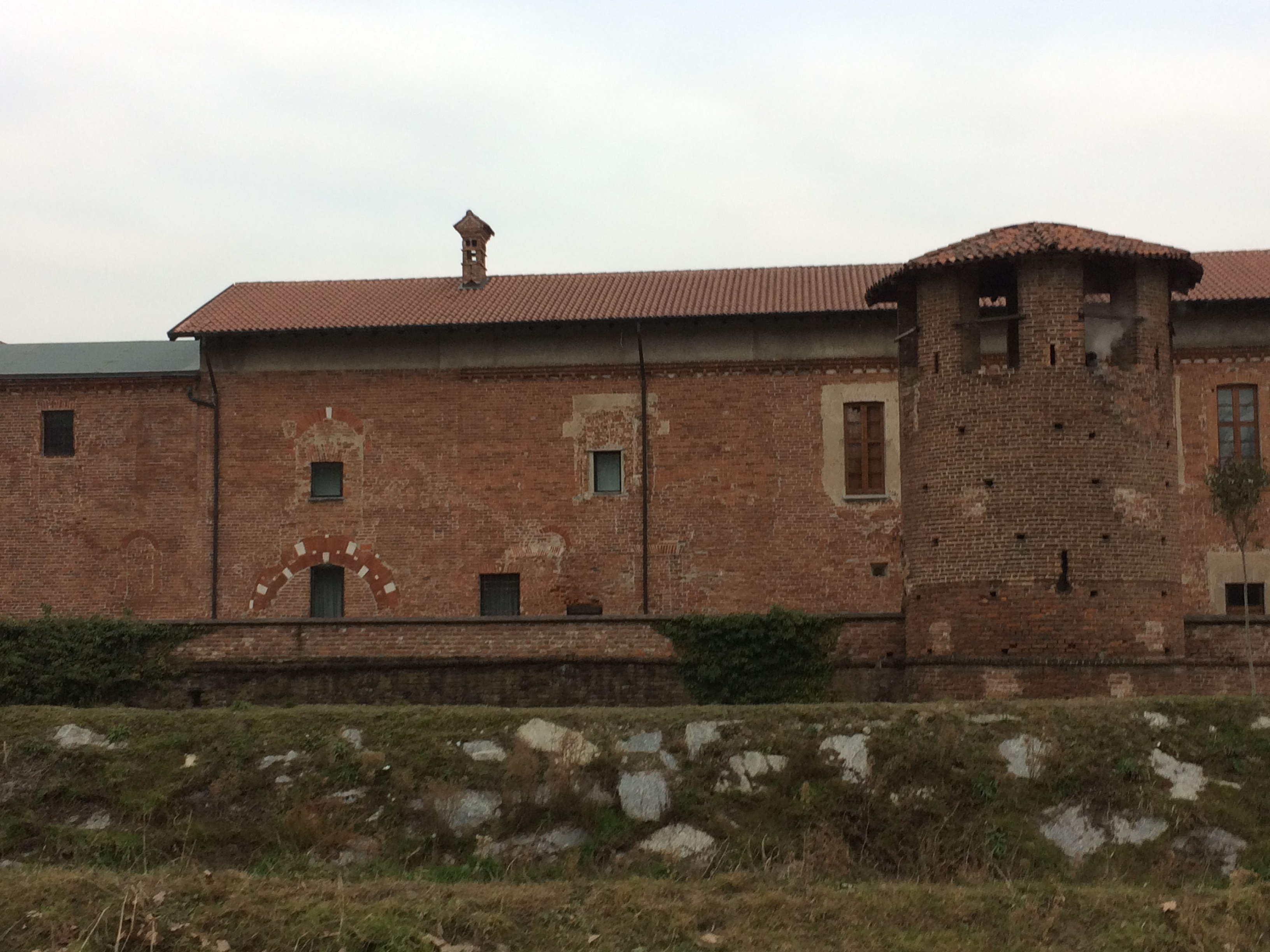 Castello di San Giorgio, Legnano